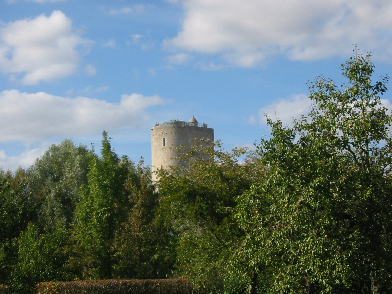 La Tour blanche, Issoudun - Photographie J. Guibourt J. Guibourt